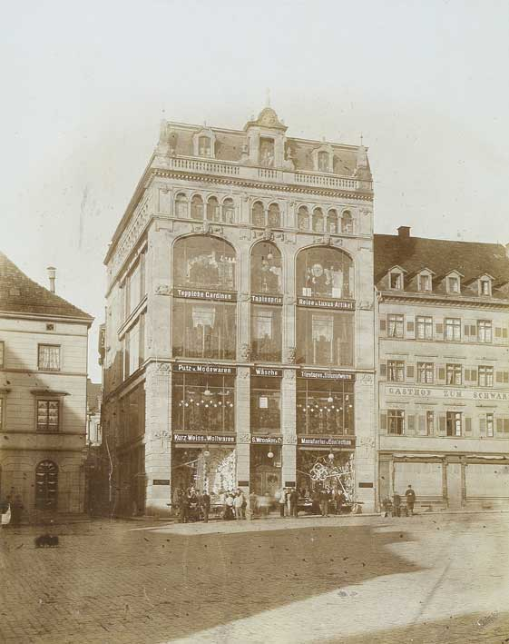 Warenhaus S. Wronker & Co. am Marktplatz in Pforzheim, Photographie von A.Schmidt, Pforzheim, dat. 1900. 28,6 x 22,2 cm.